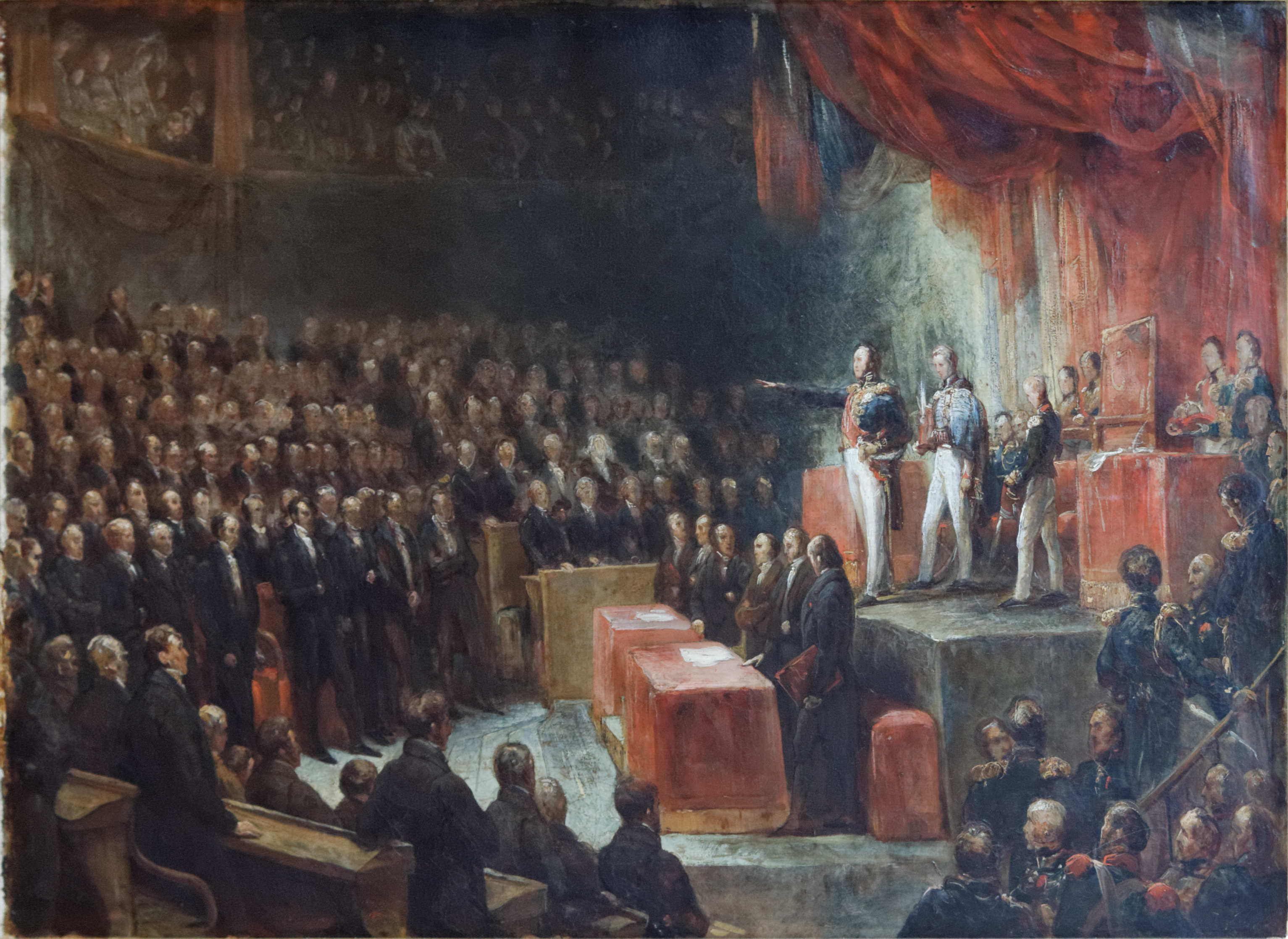 Accompagné de deux de ses fils, le nouveau roi « jure d'observer fidèlement la Charte constitutionnelle, de ne gouverner que par les lois et d'agir en toute chose dans les seules vues de l'intérêt, du bonheur et de la gloire du peuple français. » Le roi reçut ensuite de quatre maréchaux sceptre, main de justice, couronne et glaive ; cette cérémonie d'intrônisation devait remplacer celle des anciens rois.